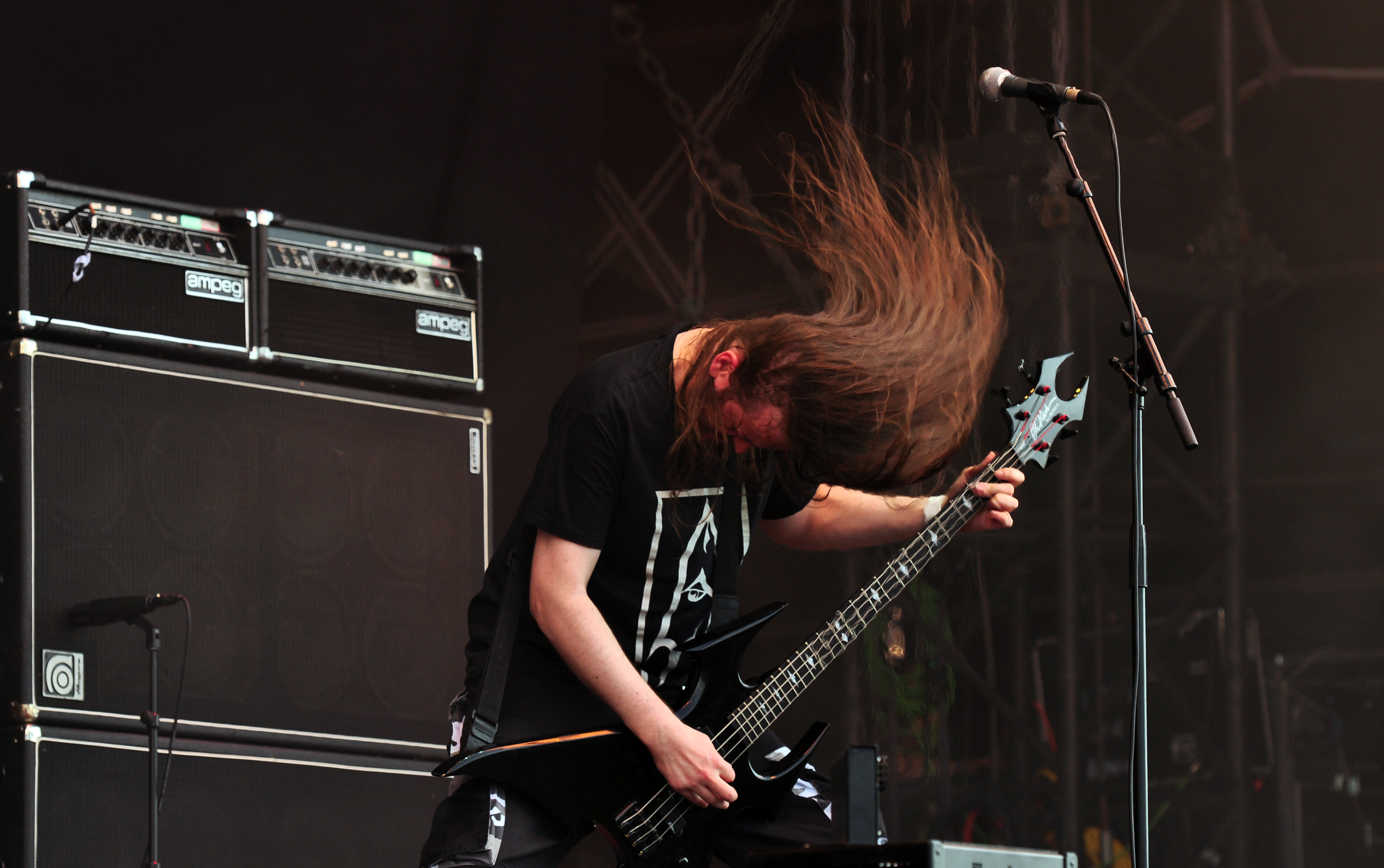 02-08-2014-Emperor at Wacken Open Air 2014-JonasR 06